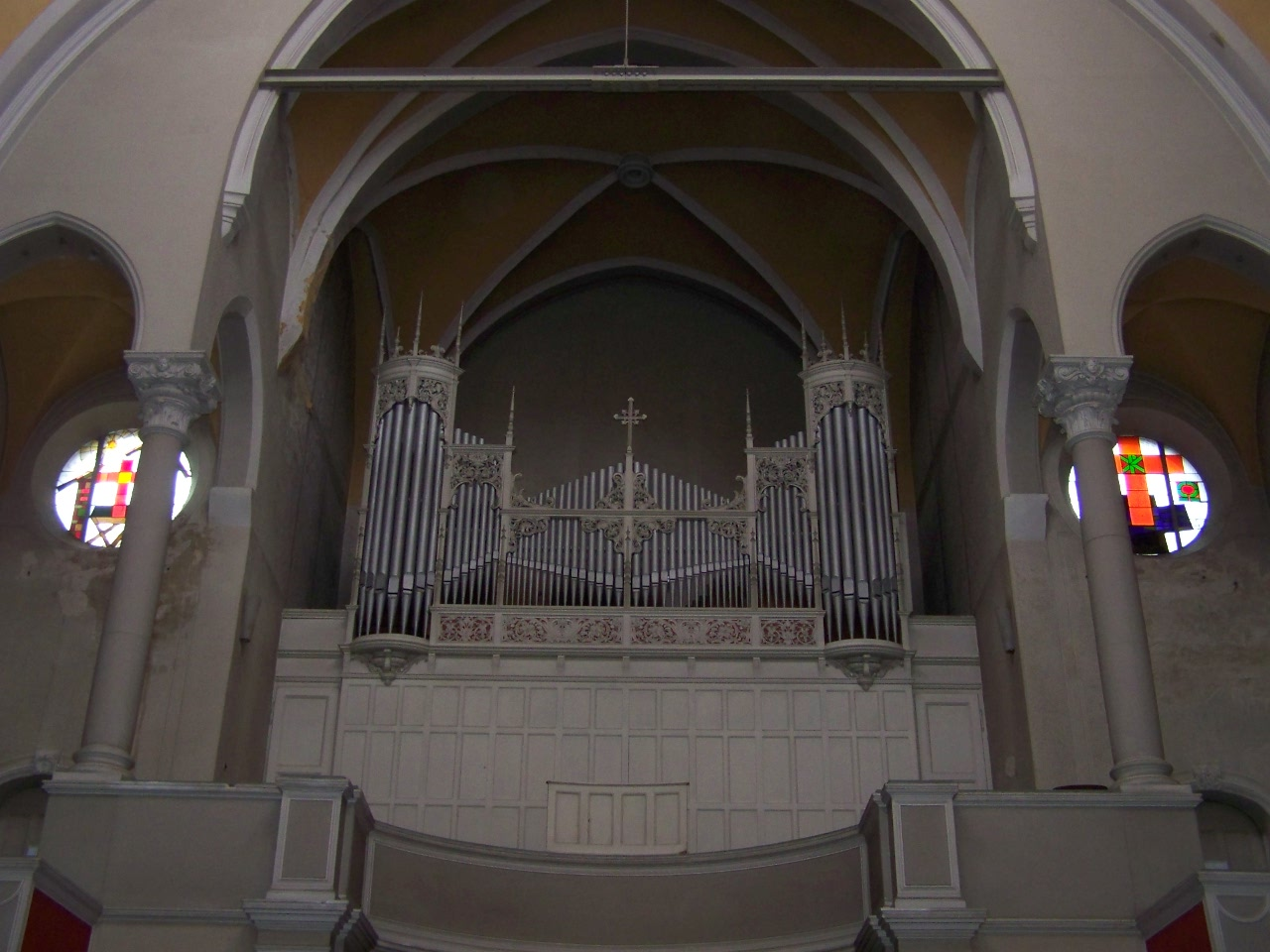 Berlin, Segenskirche Prenzlauer Berg, Orgel (2008-09-20).JPG